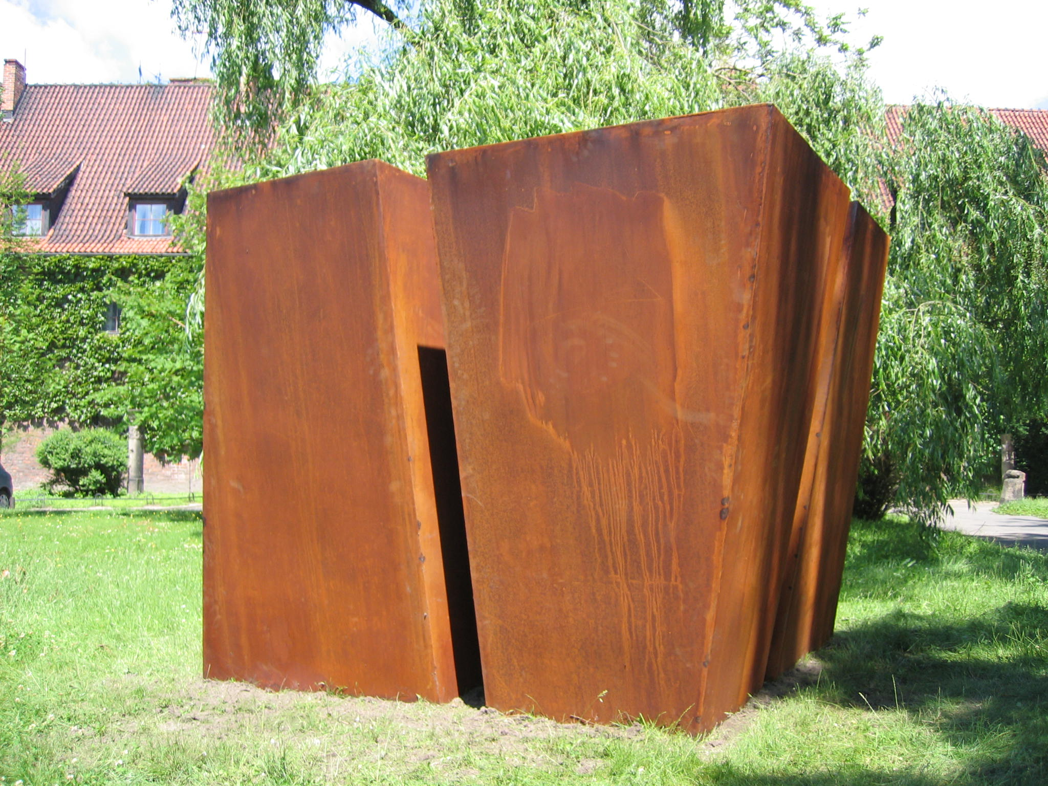 sculpture Würfelobjekt by Kurt Fleckenstein in Wroclaw/Poland